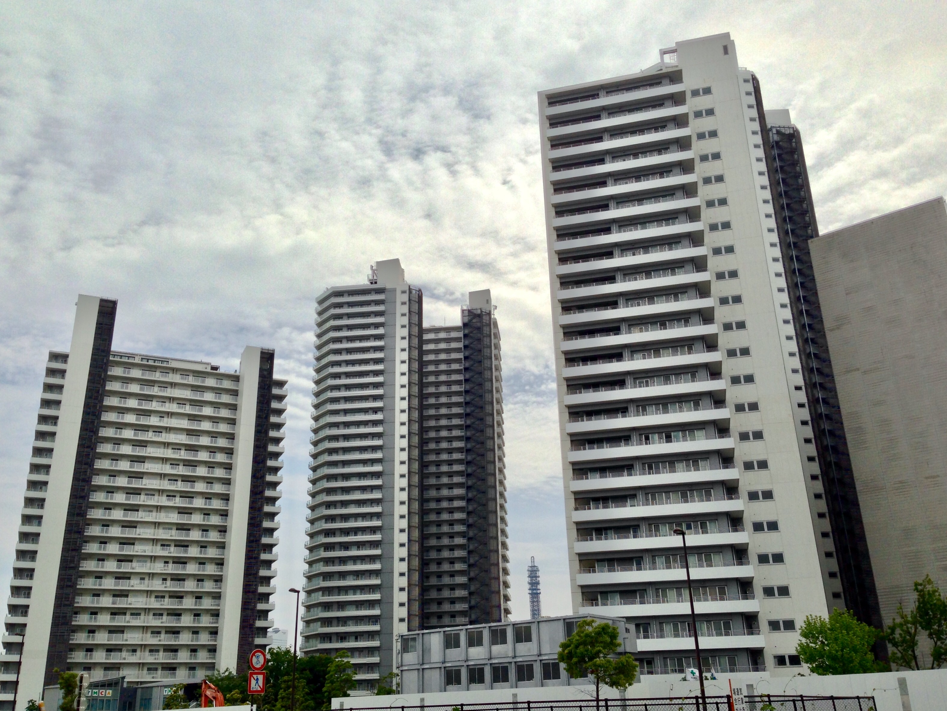 コットンハーバー地区のマンション群。